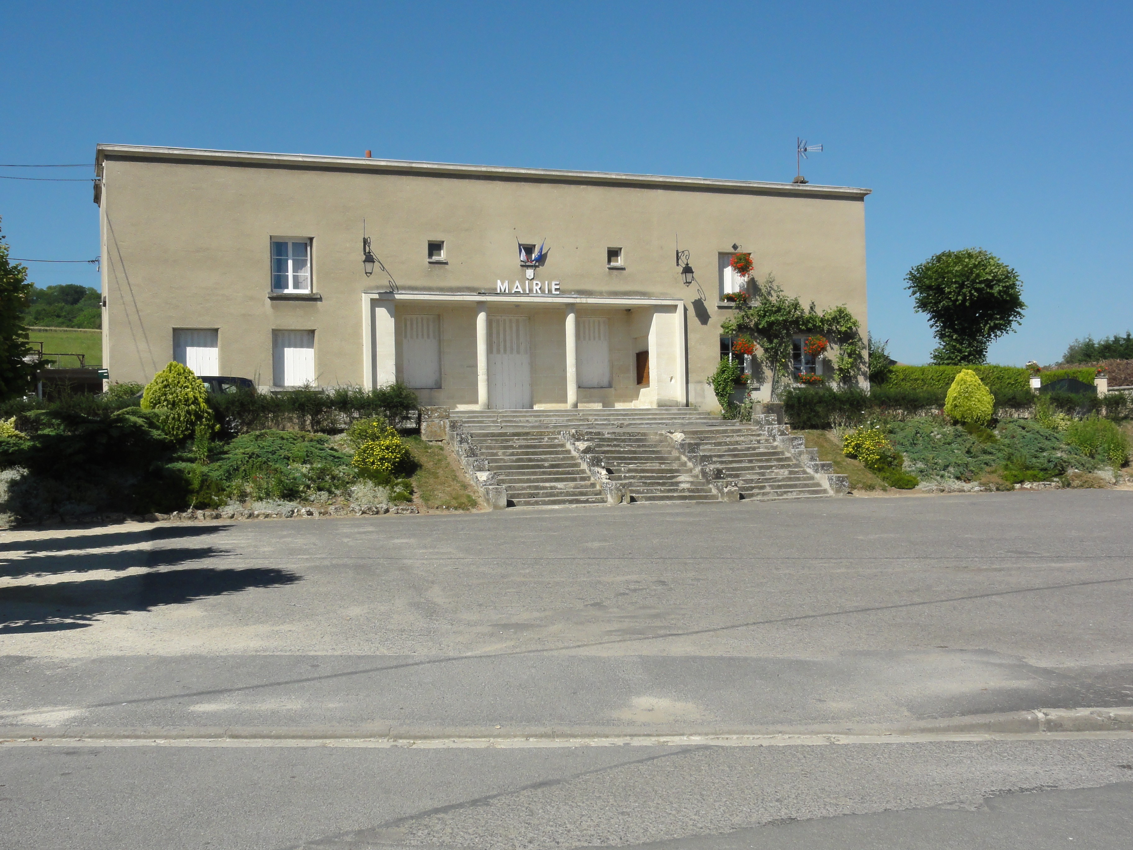 Maizy (Aisne) mairie